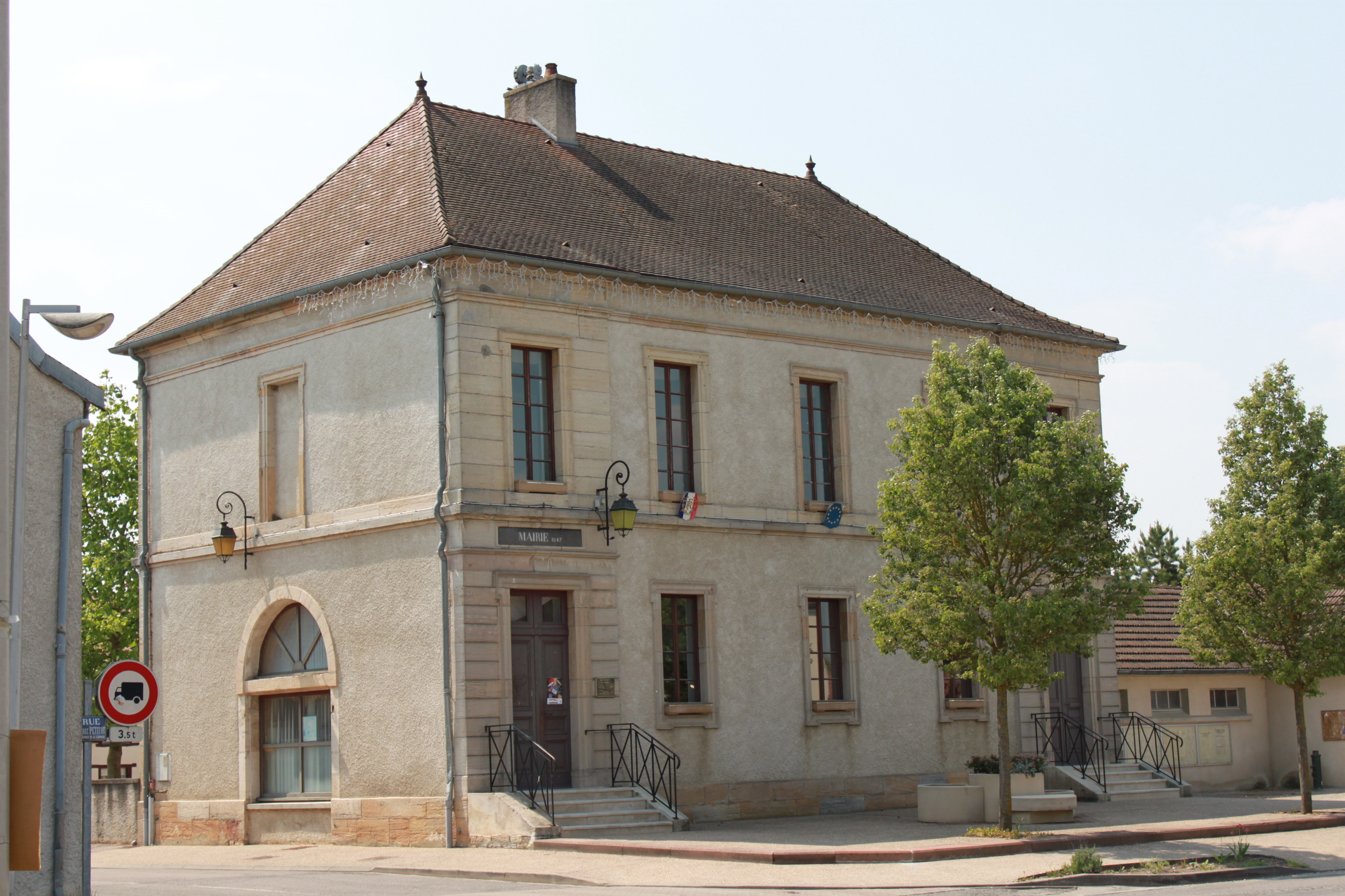 Couternon, Bourgogne, FRANCE